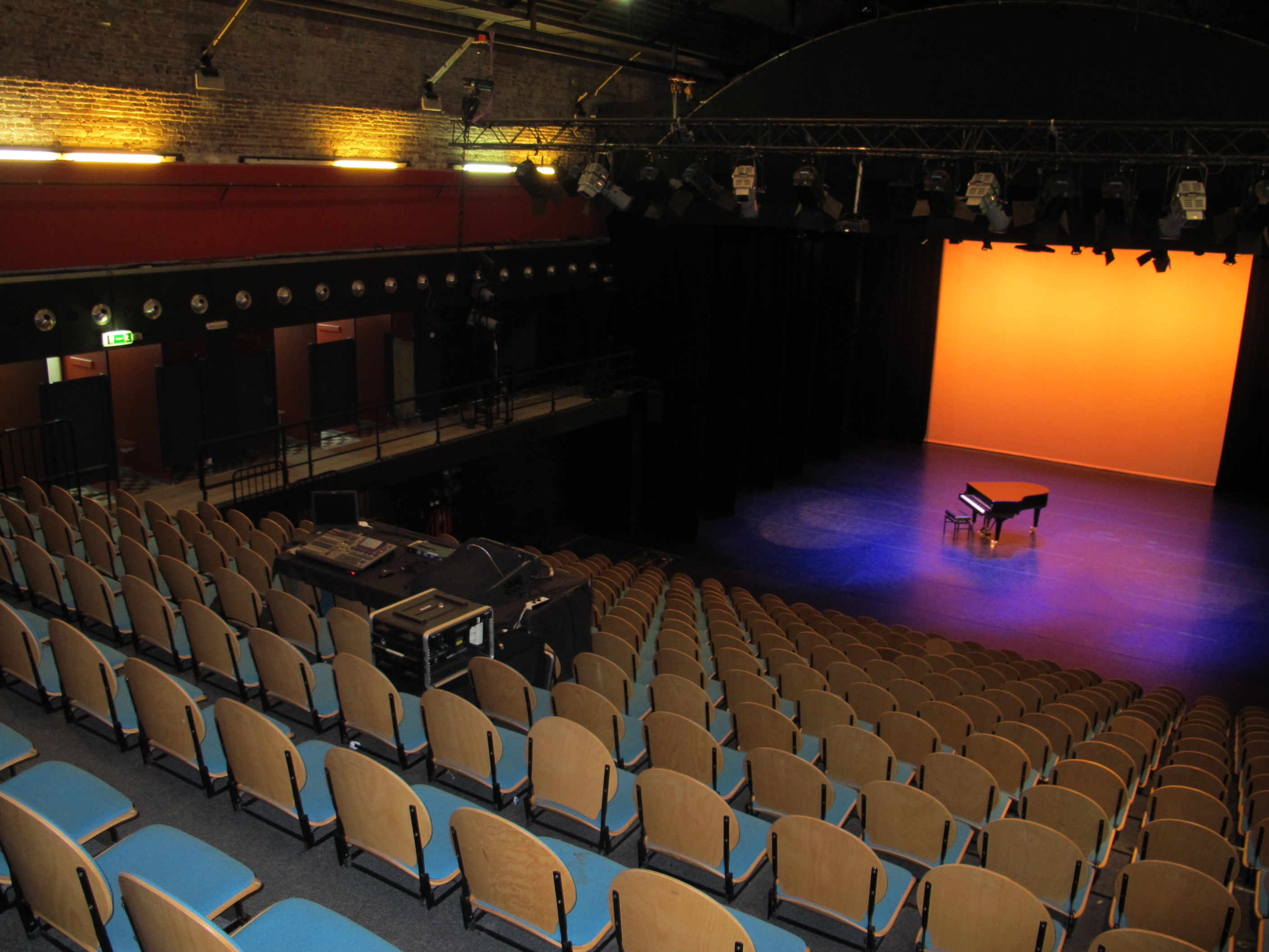 Grote zaal